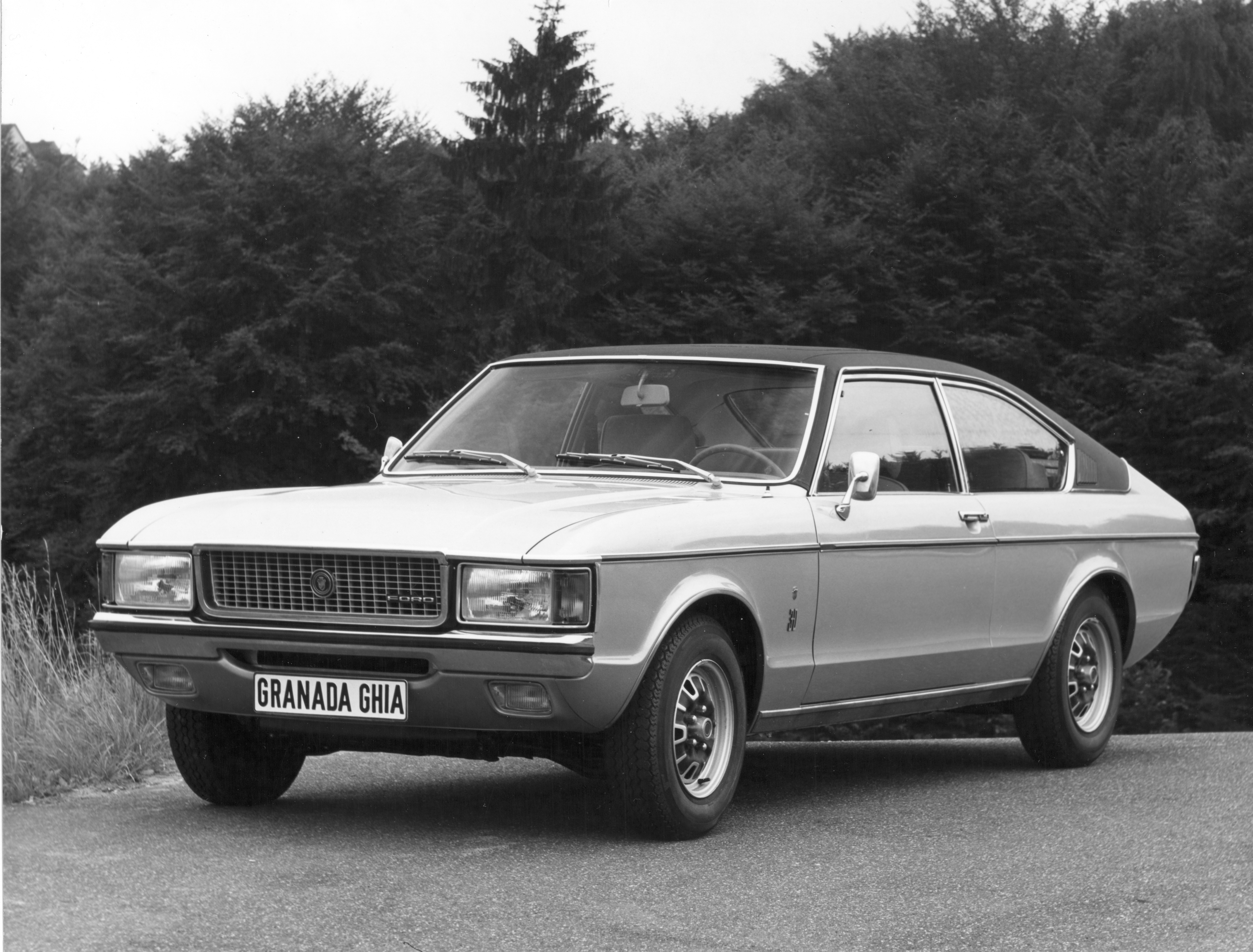 1974 Granada 3,0 Ghia coupé